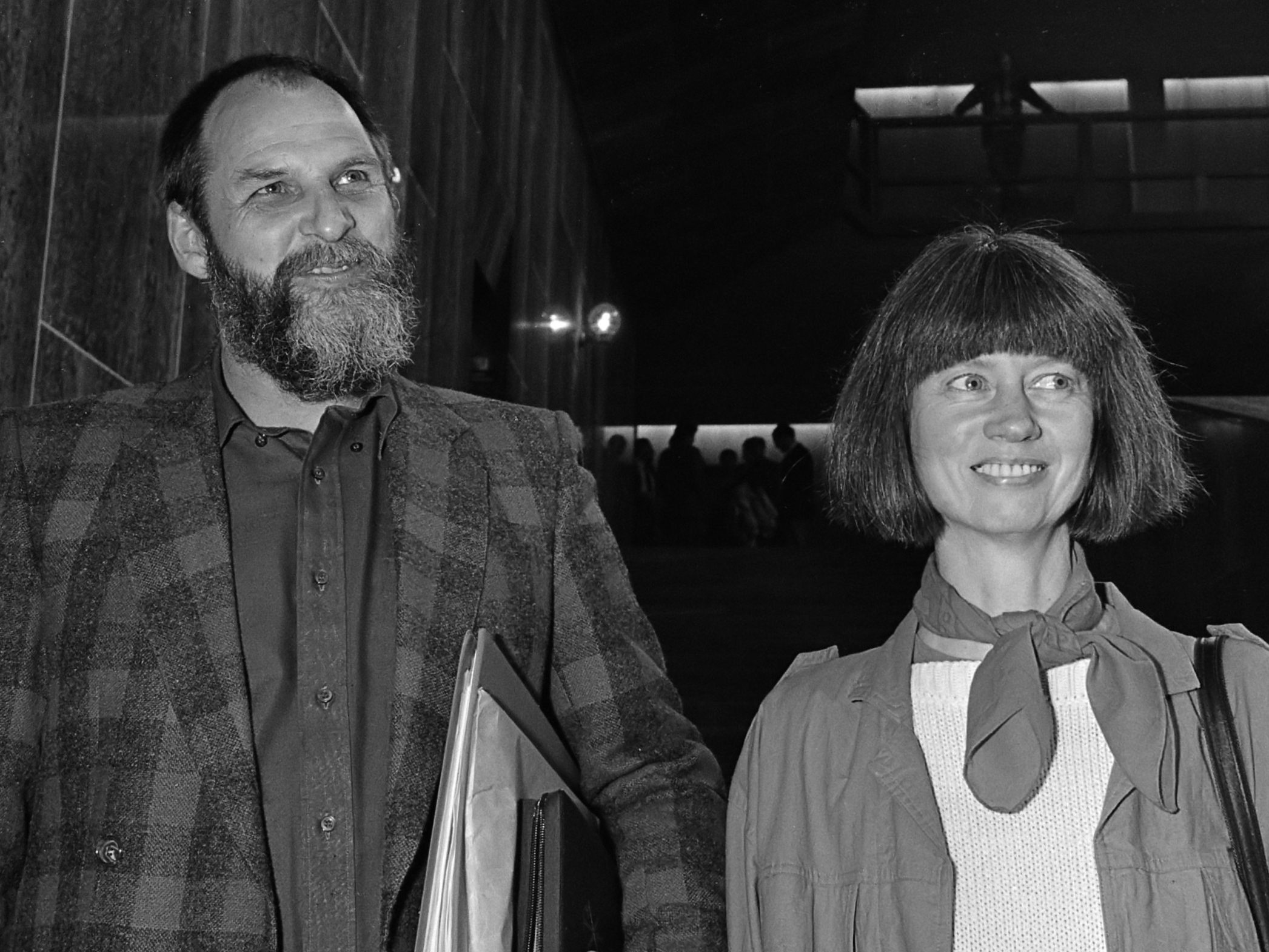 Kort geding tegen evangelistenechtpaar Goeree; Lucas en Jenny Goeree 6 september 1985